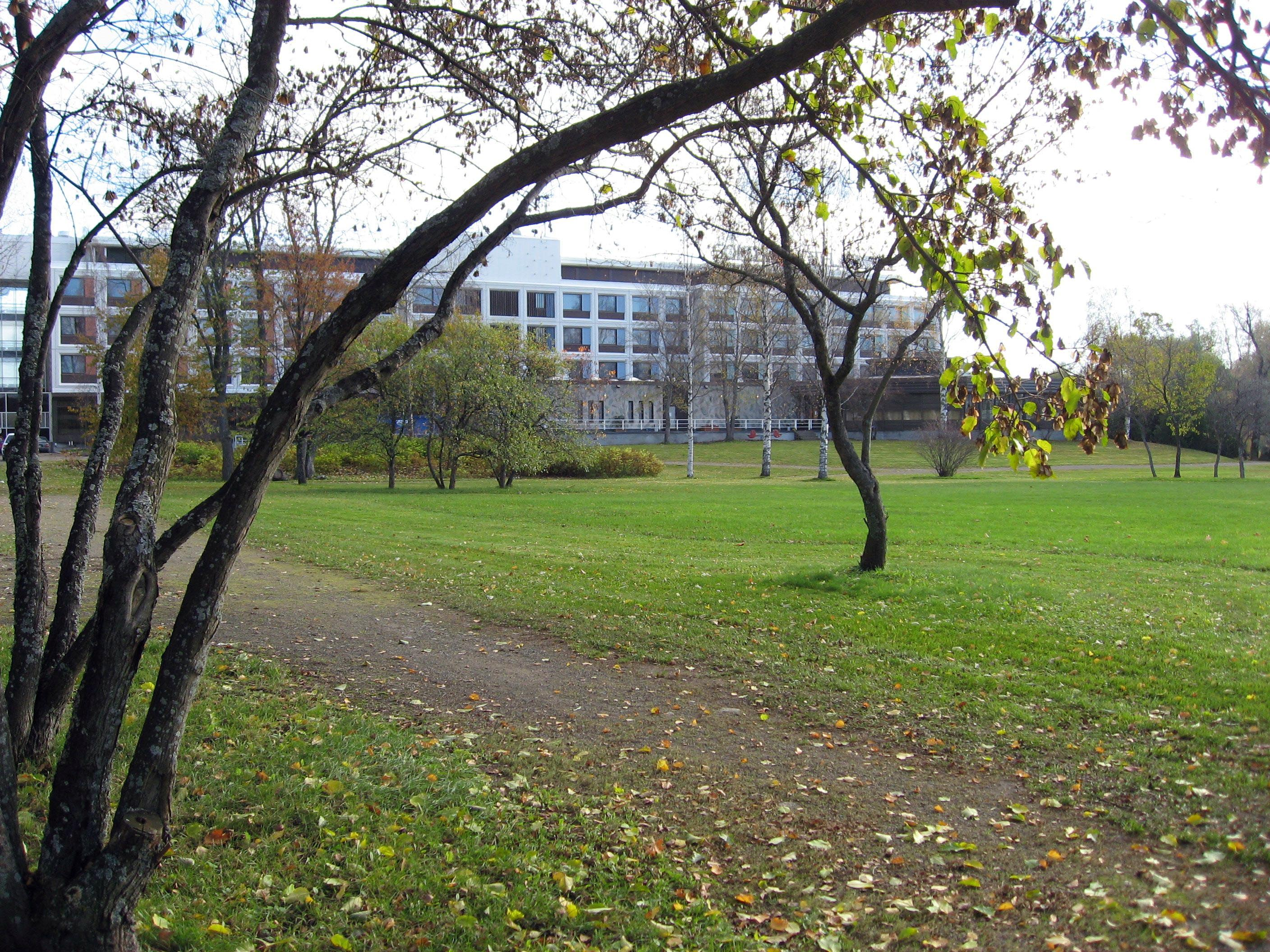 Kimmel park, Joensuu